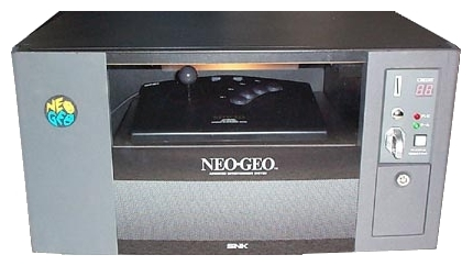 Photographie du "Neo-Geo Hotel Unit"